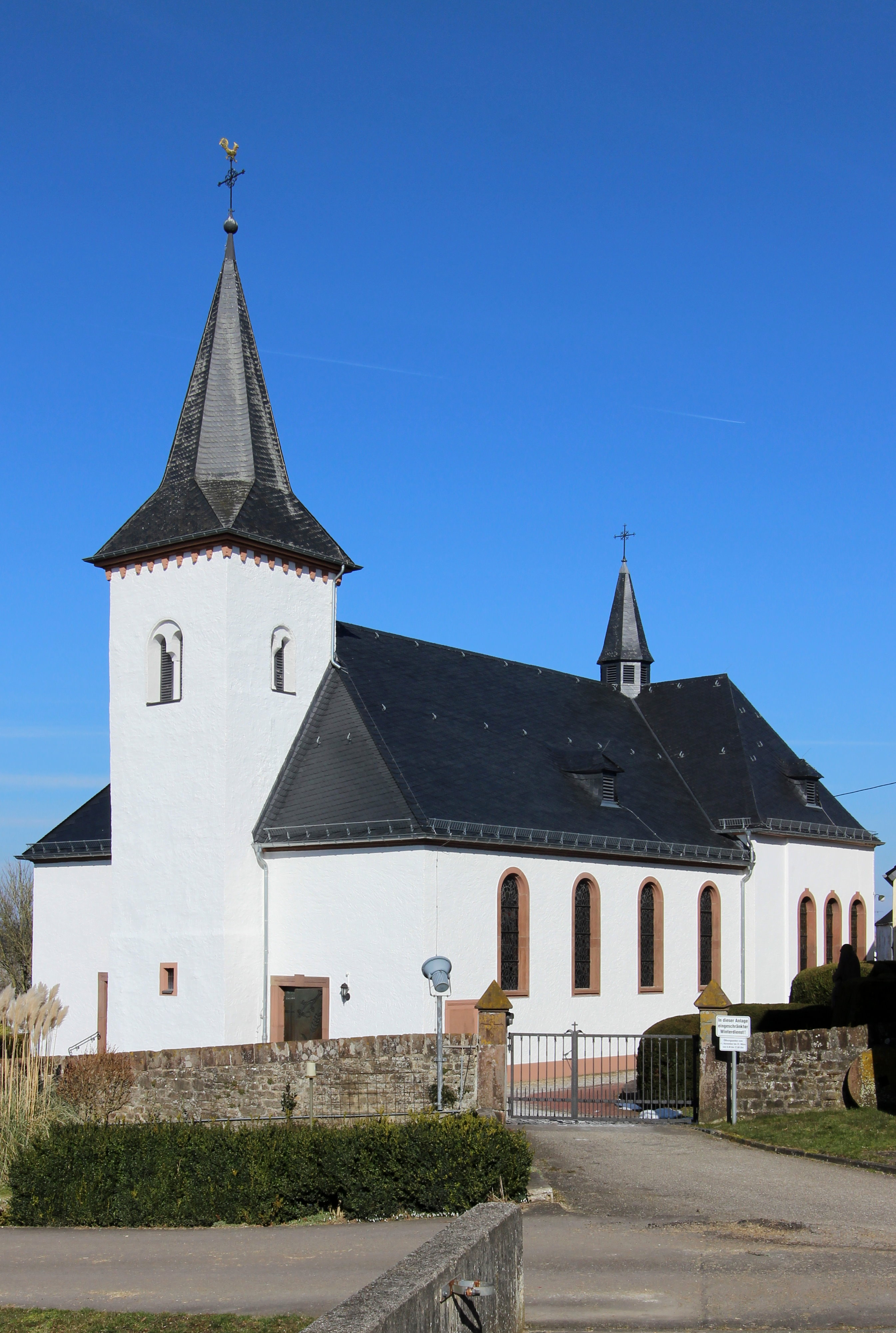 54634 Bitburg-Mötsch, Ringstraße. Mittelalterlicher Westturm, Schiff bezeichnet 1786, Querhaus mit Vierungstürmchen 1922/23, Architekt Eduard Endler, Köln; das ehemalige Südportal heute Ehrenmal; Epitaph, Rotsandstein, bezeichnet 1600, Nachfolge der Trierer Bildhauerschule des Hans Ruprecht Hoffmann; Kirchhofskreuz, 1873. Aufnahme von 2018.